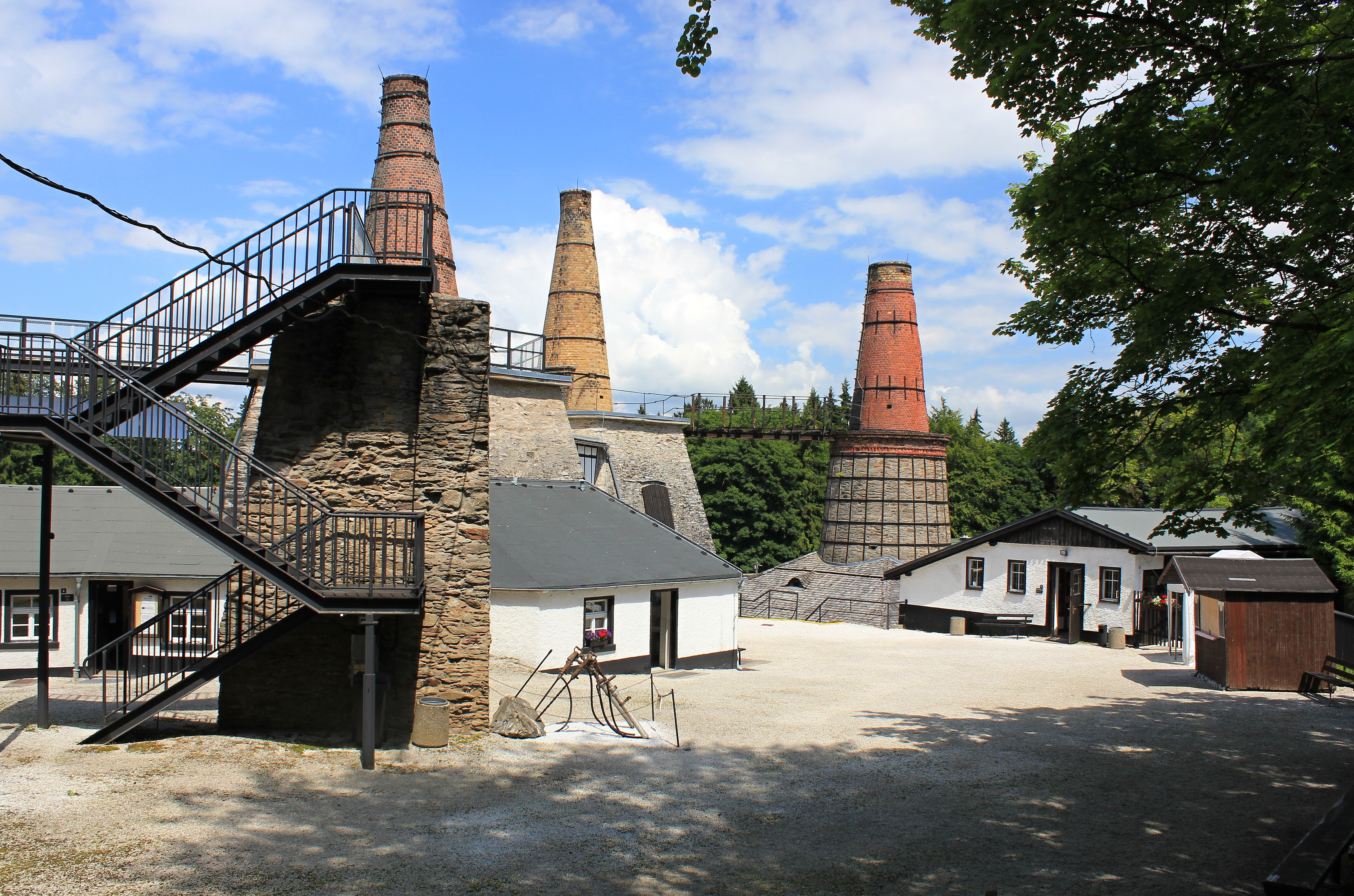 Kalkwerk Lengefeld, Technisches Museum im Erzgebirge.Sachsen. Bundesstrasse 101.